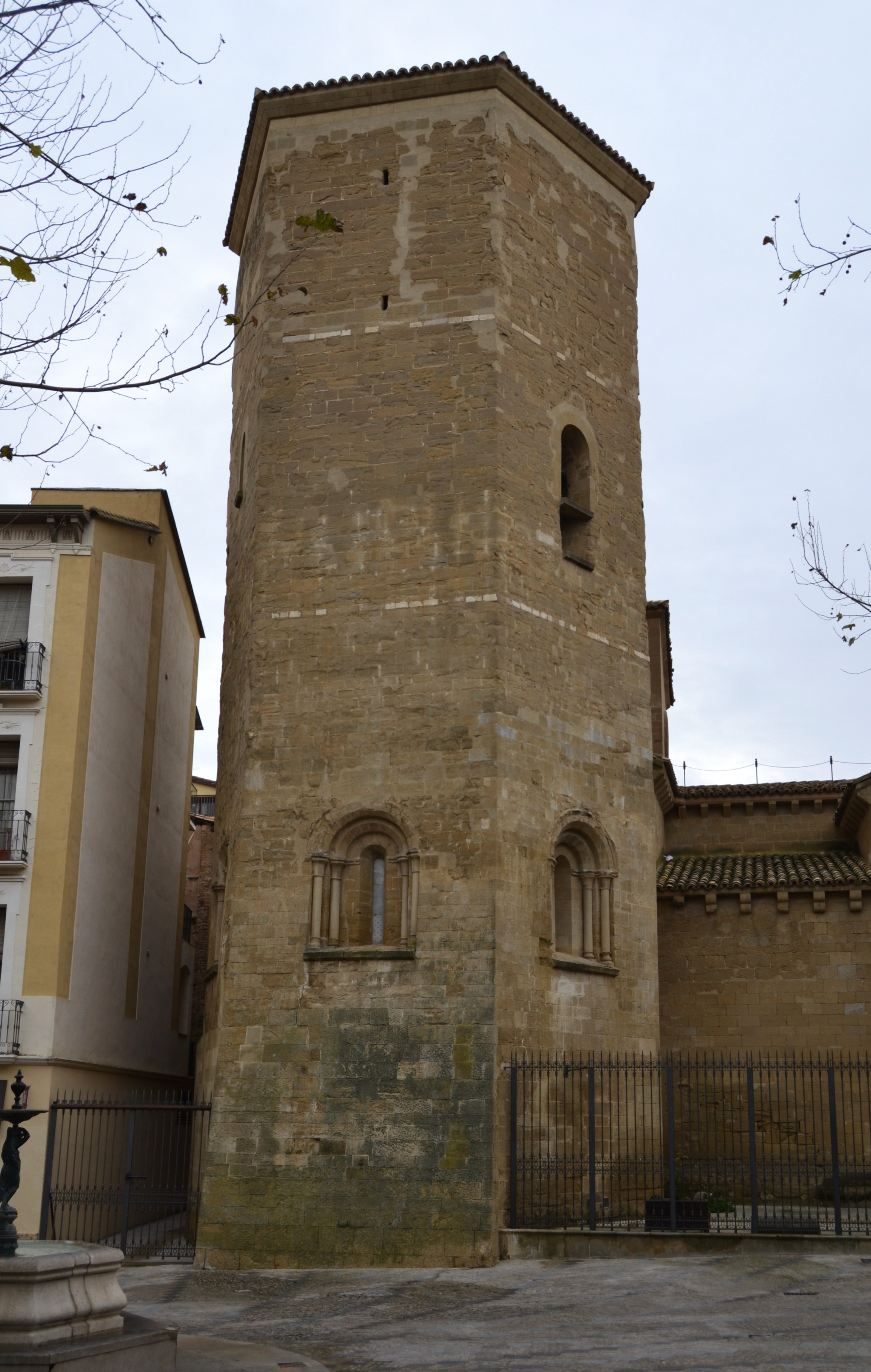 Monesterio de Sant Per o Viello, campanal.